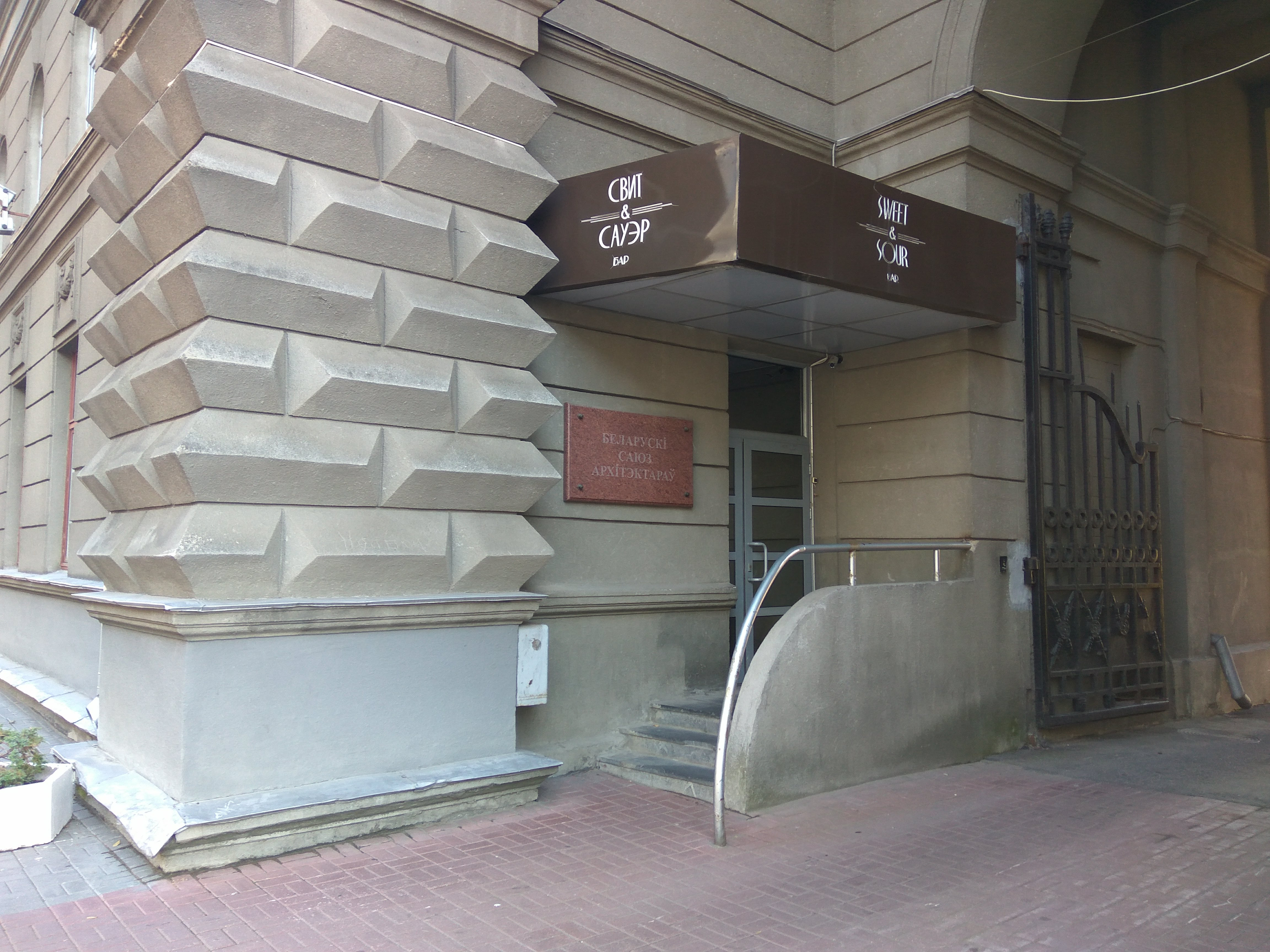 Мінск. Вуліца Карла Маркса. Беларускі саюз архітэктараў